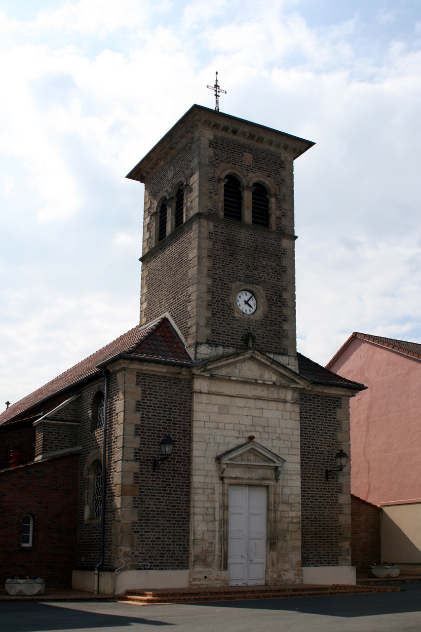 Eglise de Montchanin les Mines